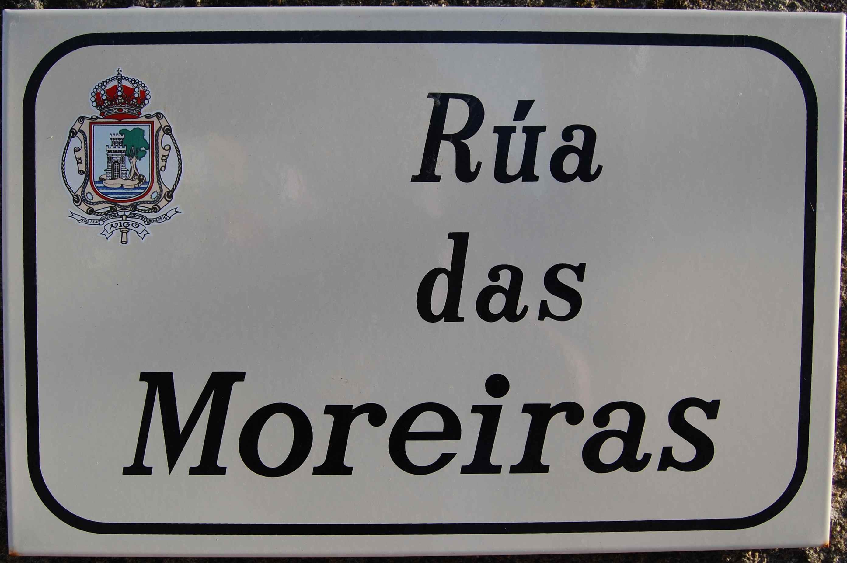 Placa de indentificação de rua Vigo.